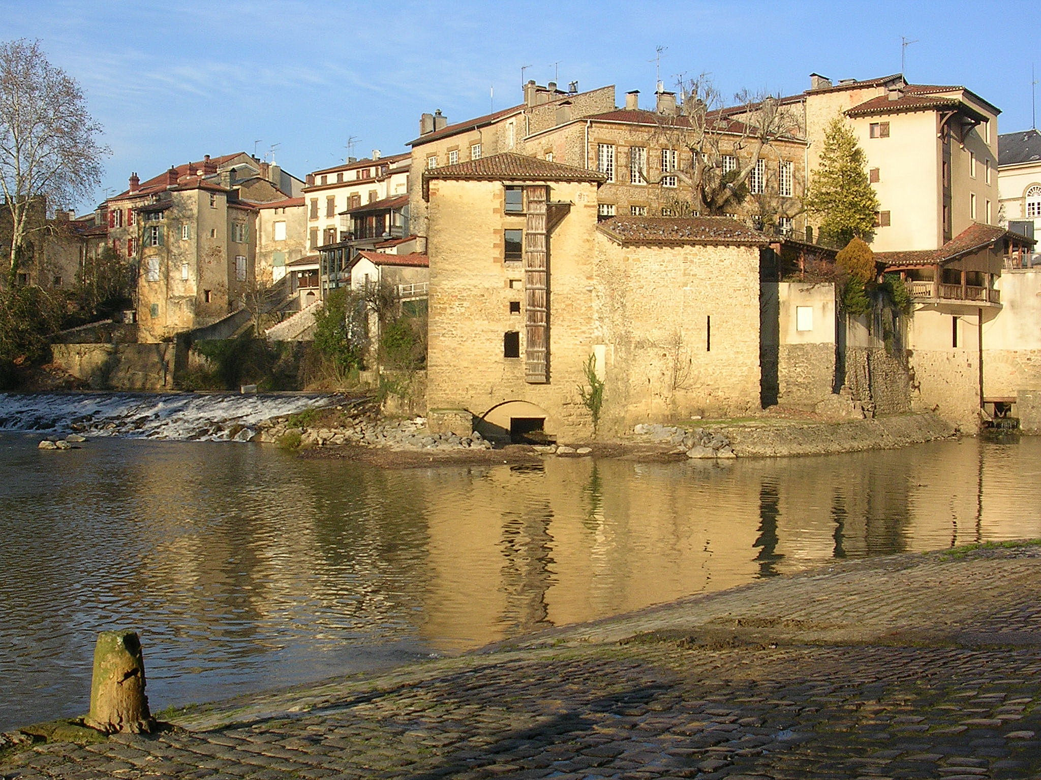 Bords de la Midouze, Mont-de-Marsan. Ancienne minoterie. Photo prise par Jibi44